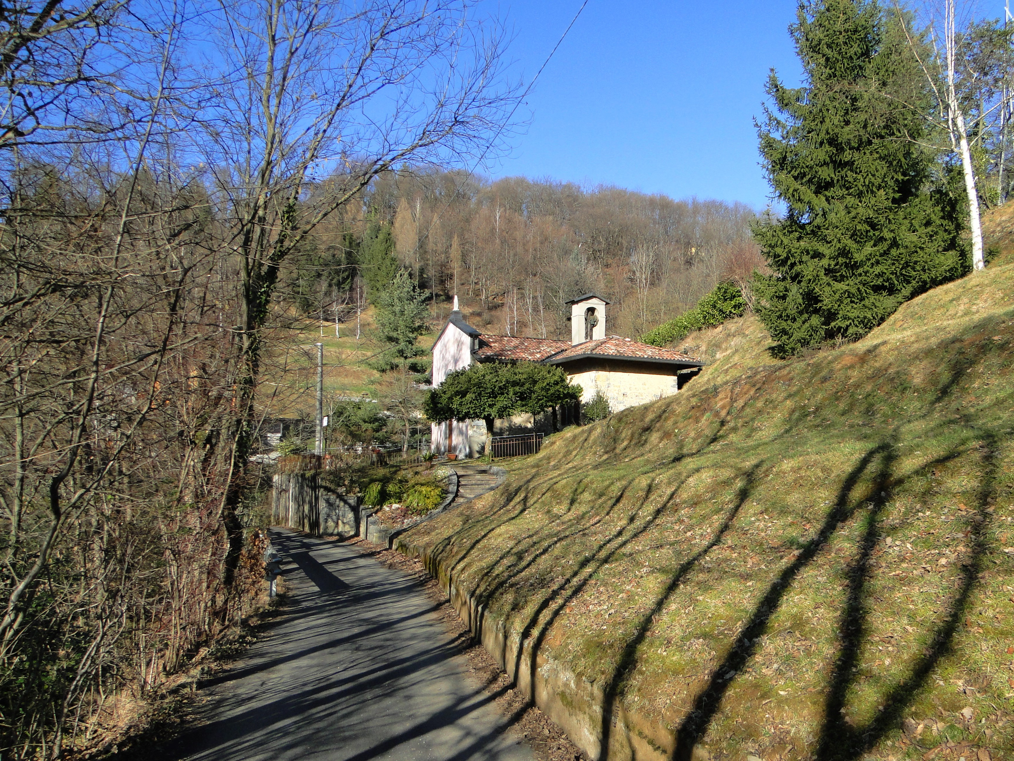 Chiesa della Vergine Immacolata, località Bozzöla. Leffe (BG). Italy